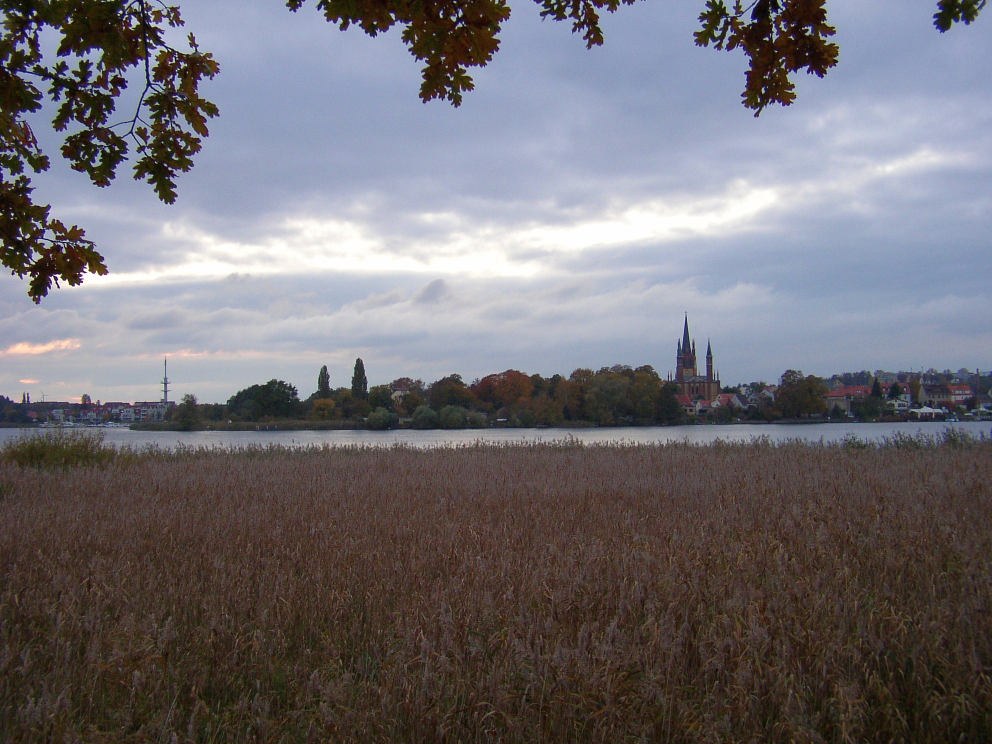 Werder (Havel) - abendlicher Blick auf die Inselstadt